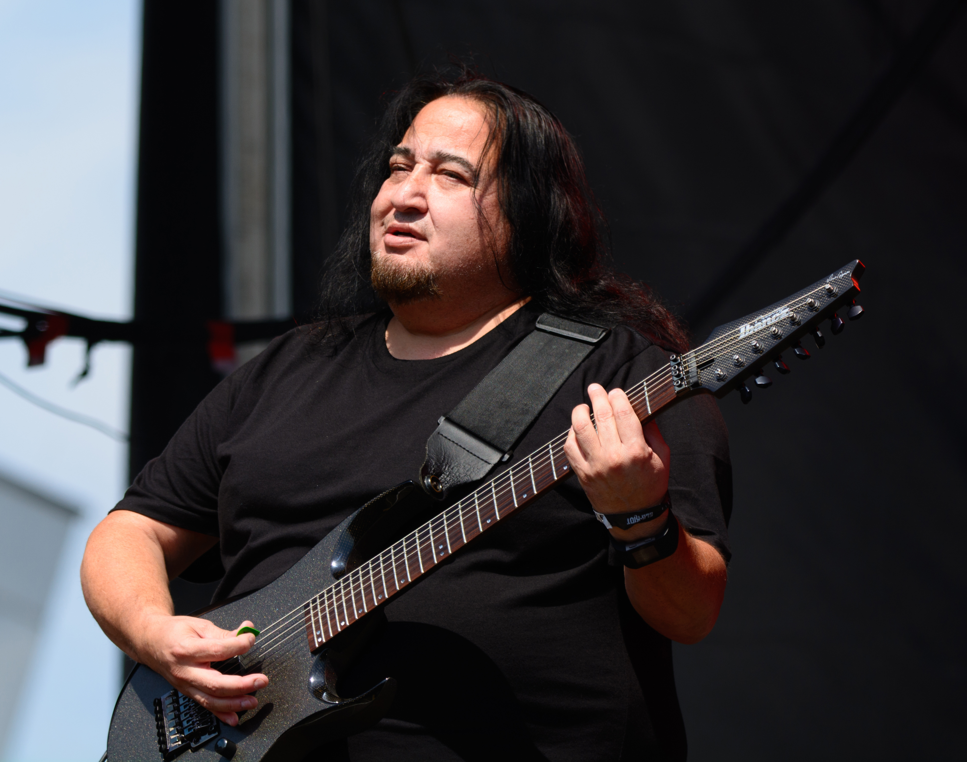 Dino Cazares beim Elbriot 2018